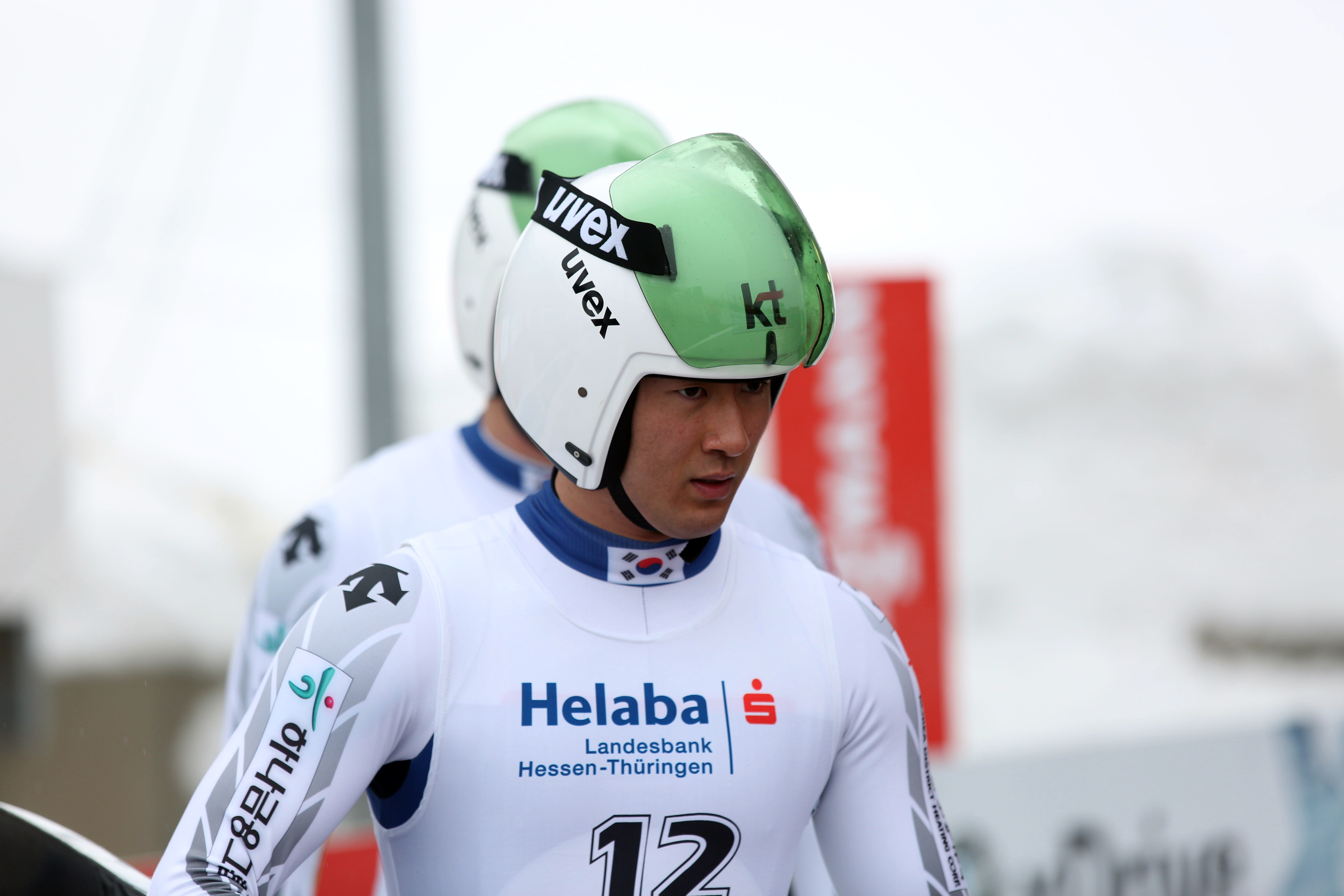 Jung Myung Cho beim HELABA Nationscup der Doppelsitzer in Oberhof 2017